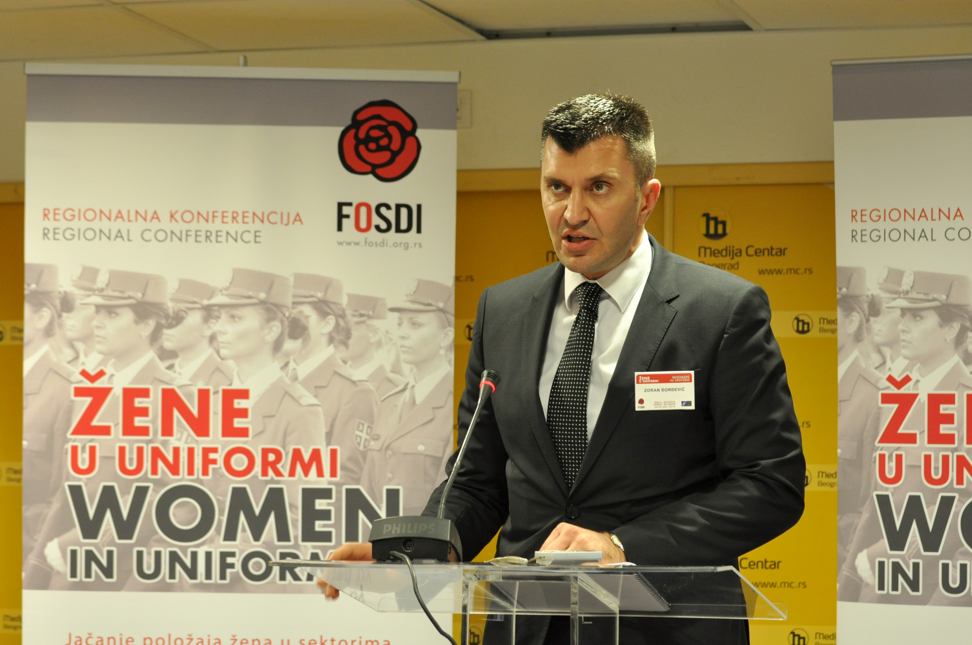 Зоран Ђорђевић српски политичар